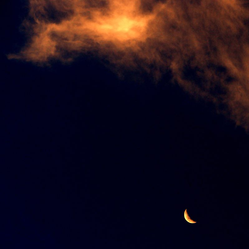 golden sky..